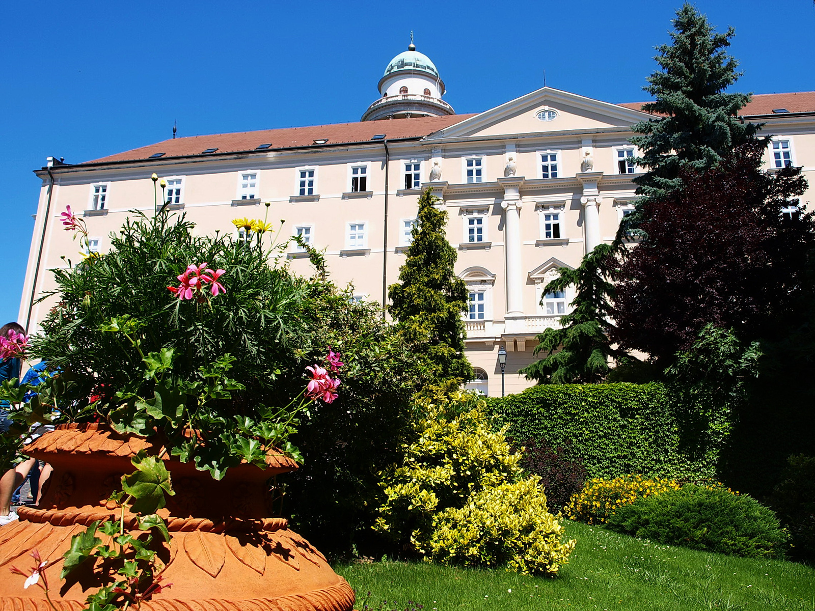 Bencés főapátsági templom (Pannonhalma, Várkerület 1 .) This is a photo of a monument in Hungary. Identifier: 4640